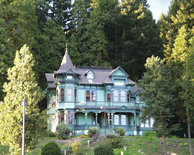 Shelton-McMurphey House, 1880, Skinner Butte, Eugene, Oregon